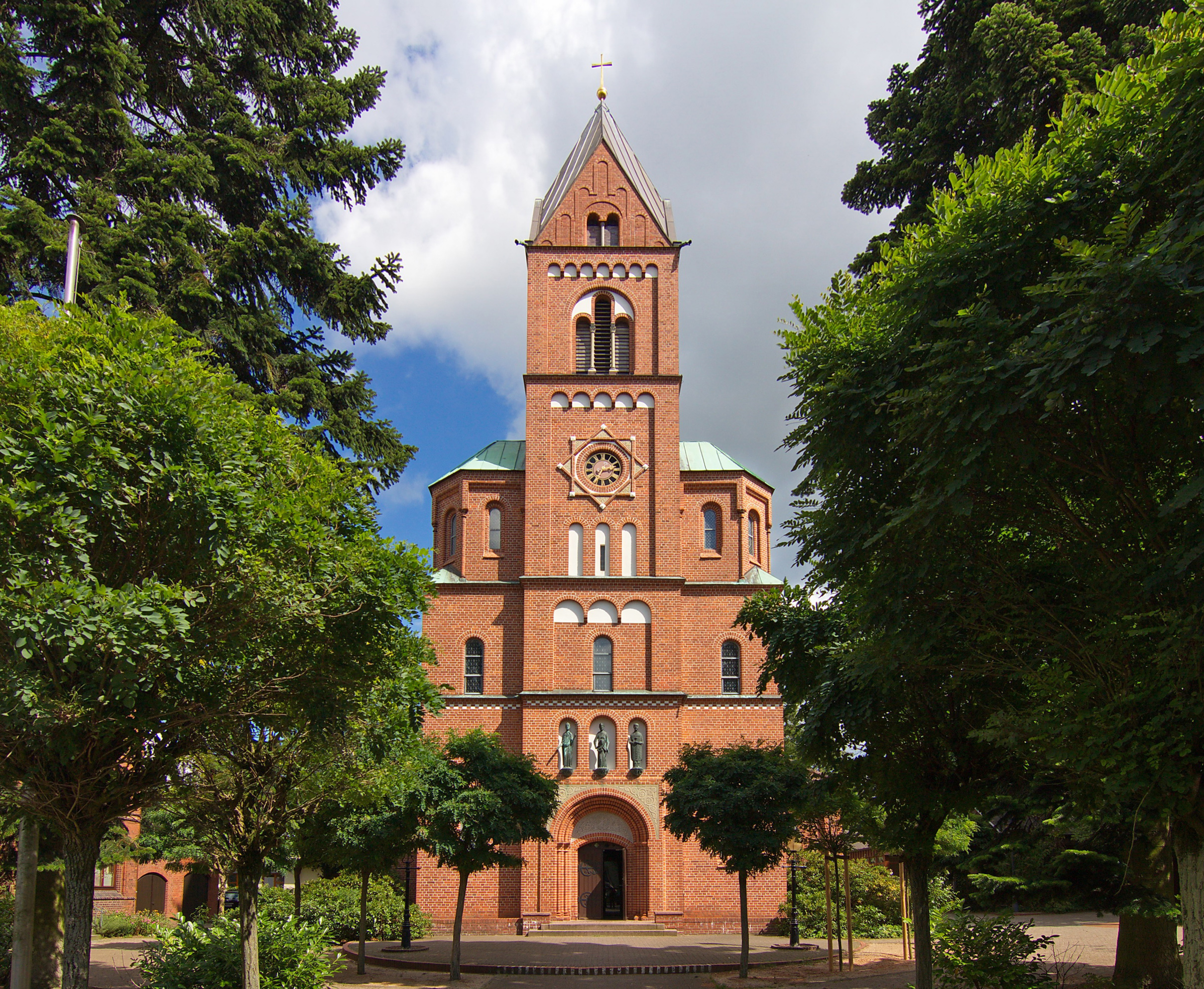 Die Propsteikirche Sankt Josef ist die römisch-katholische Pfarrkirche im niedersächsischen Verden (Aller). Sie befindet sich am Altstadt-Wallring.